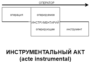 Схема инструментального акта (действия) по Л.Х. Прието